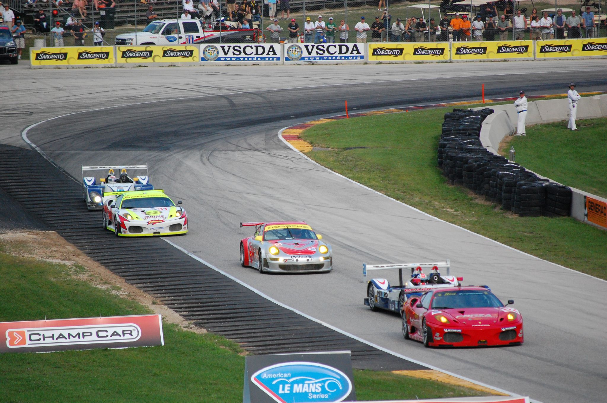 Porsche RS Spyders, Ferrari F430s, Porsche 997 GT3 RSR at Generac 500, 2007